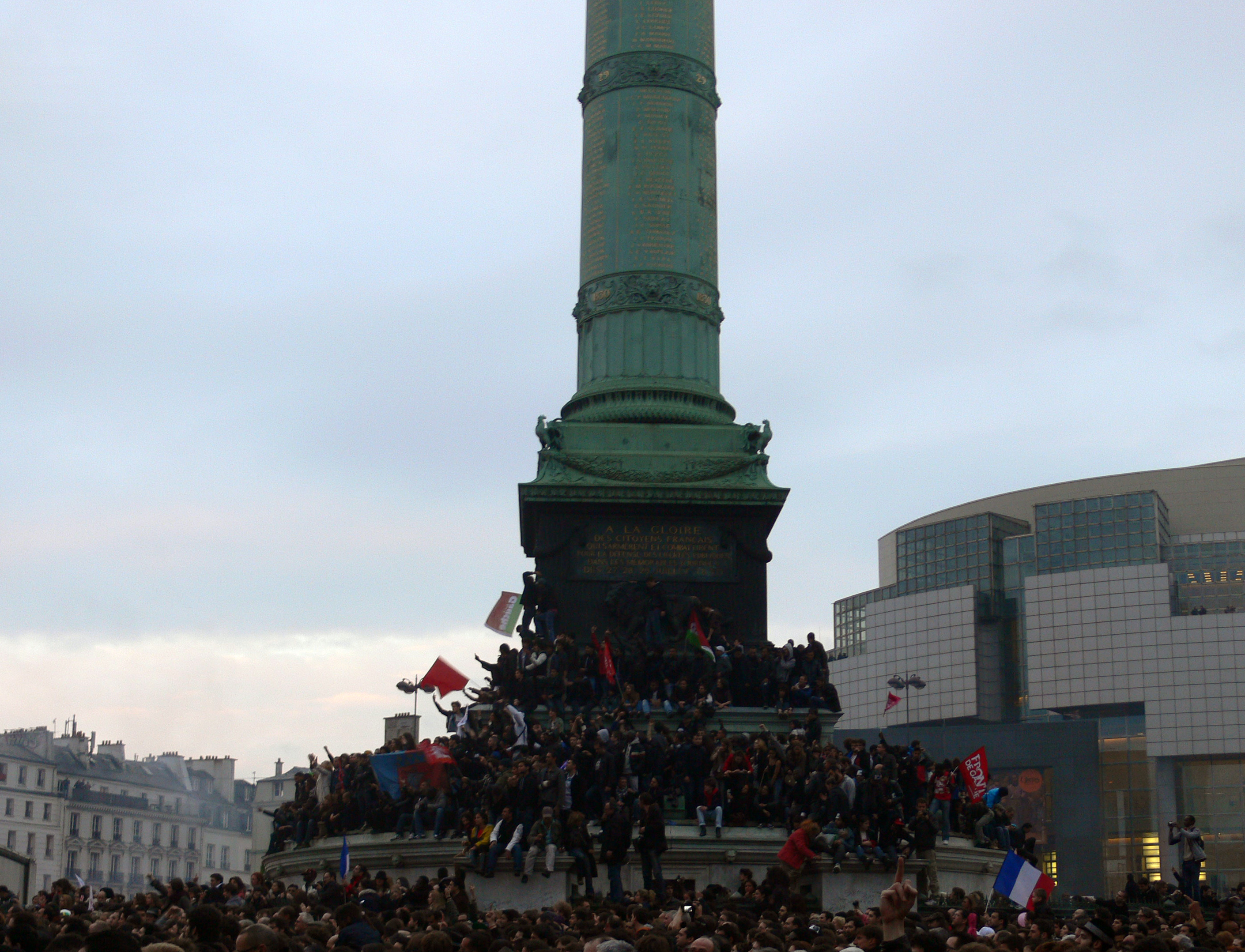 2012 French presidential election - Bastille Square crowd